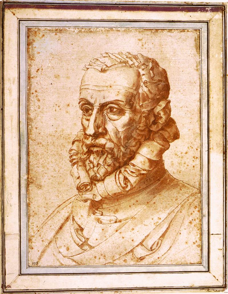 detail